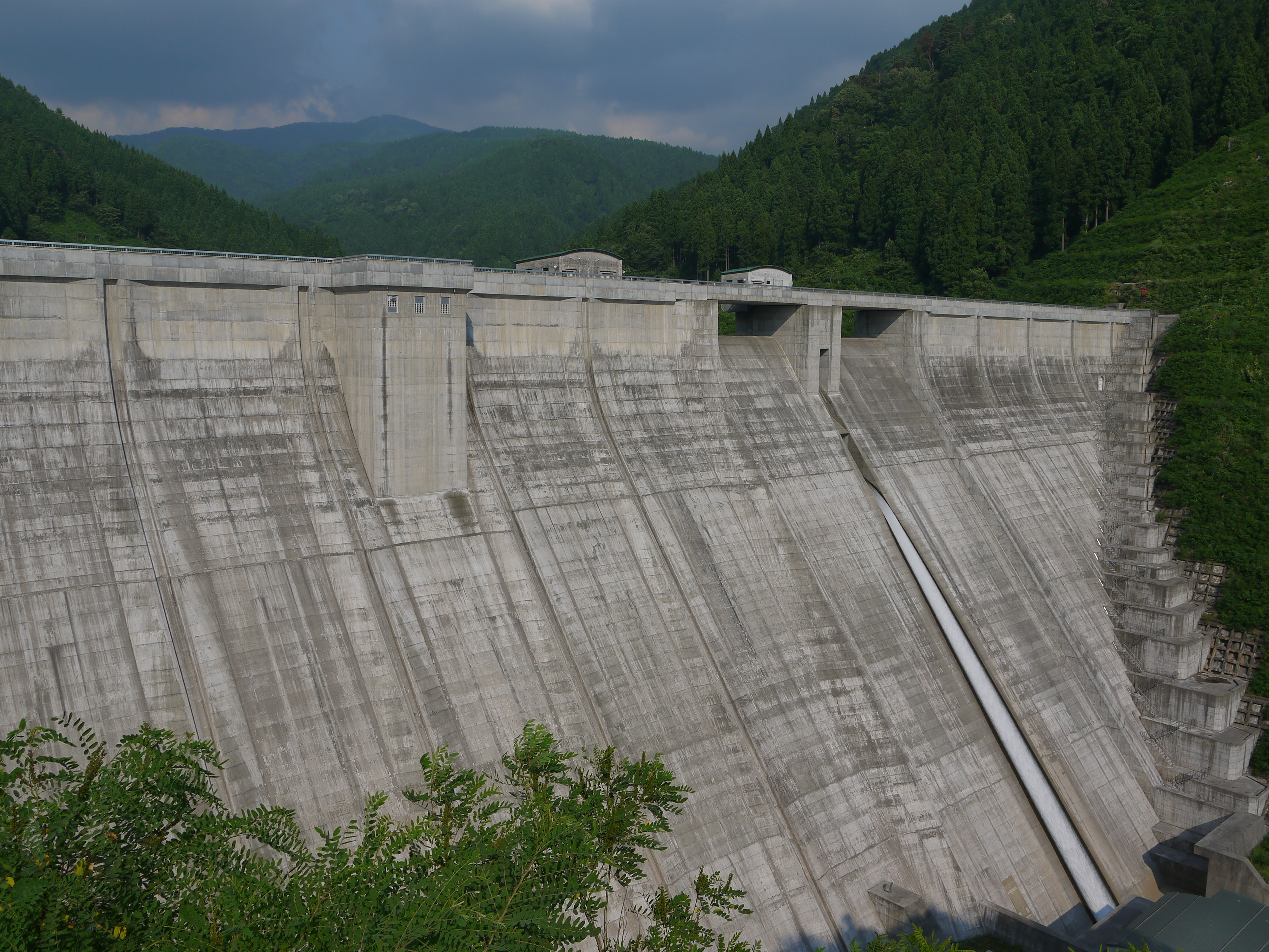 浄土寺川ダム下流から望む浄土寺川ダムと法恩寺山